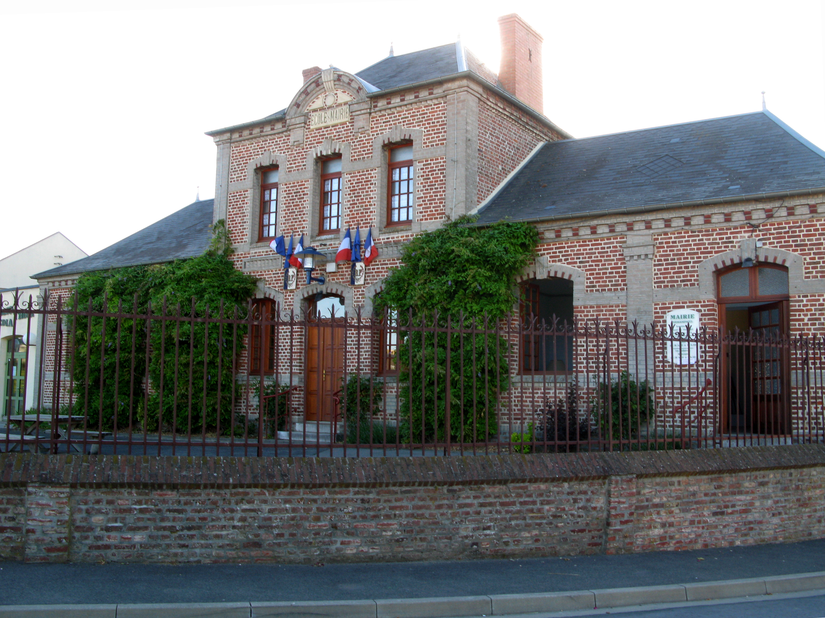 Grouches-Luchuel (Somme, France) - La mairie. . .